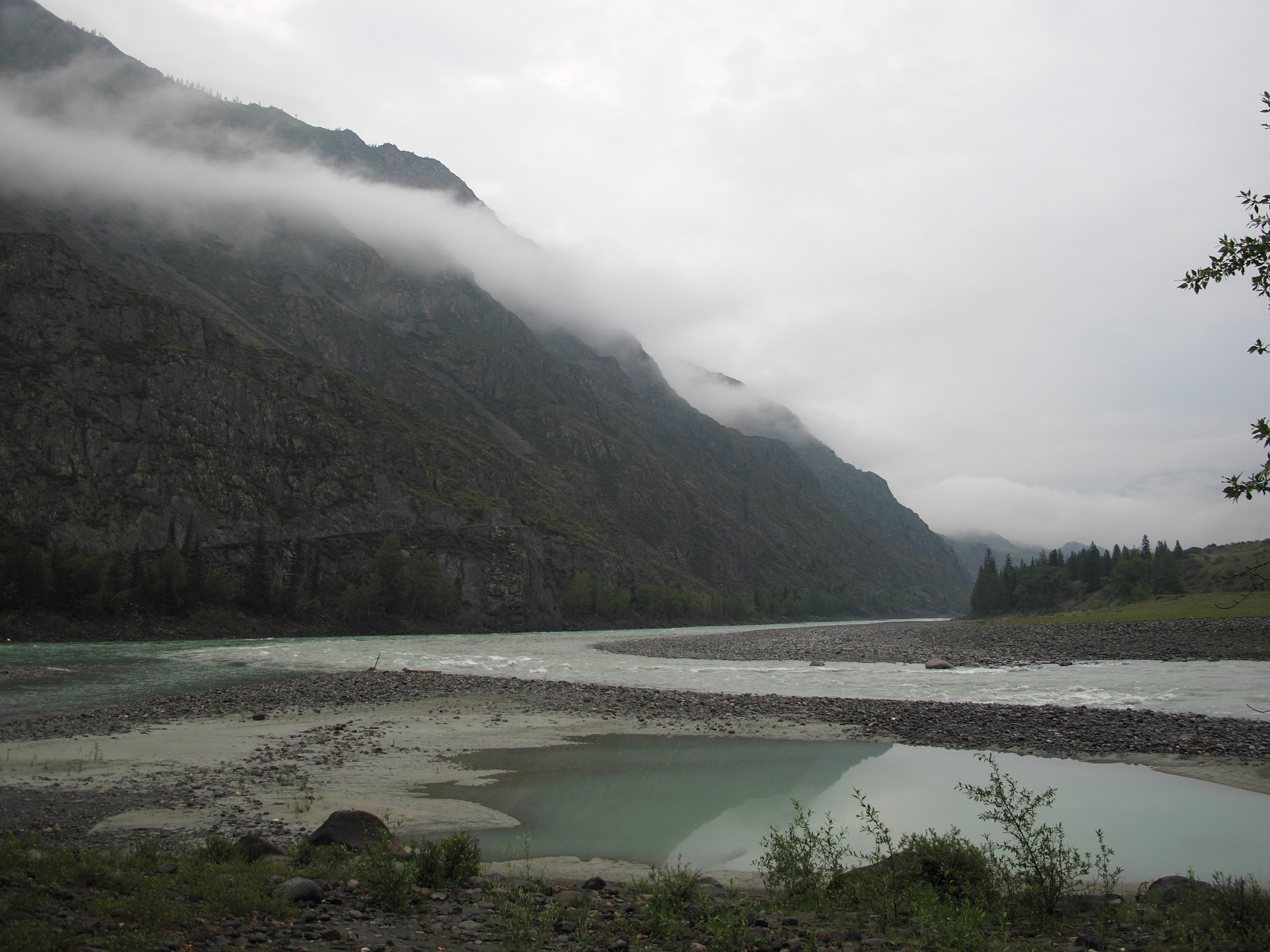 Устье Аргута, Усть-Коксинский район, Республика Алтай